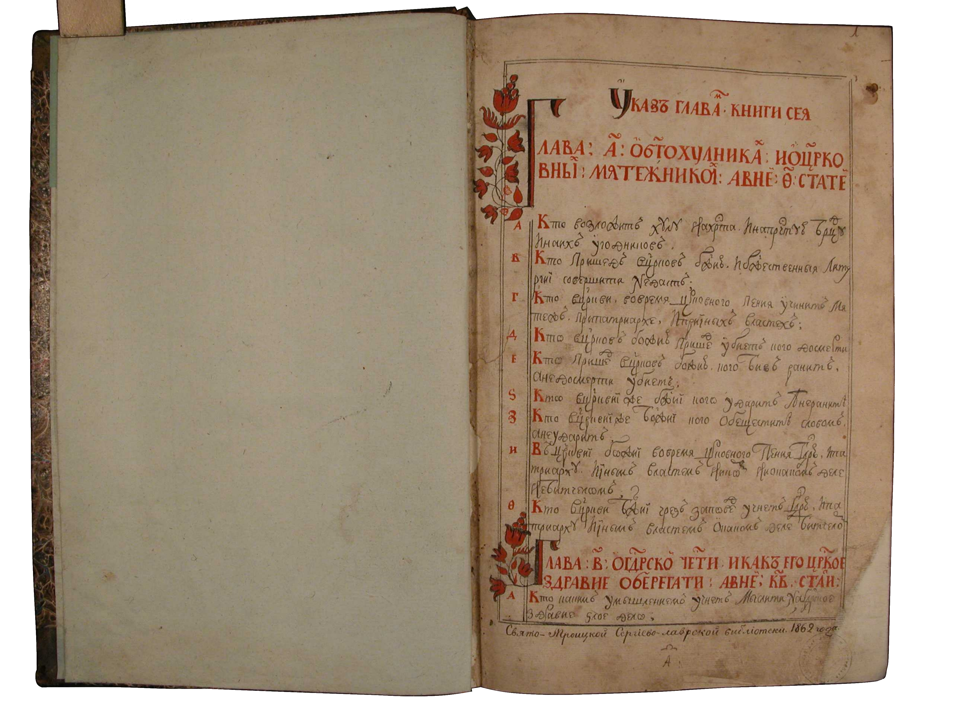 Первая страница экземпляра Сводного уложения.